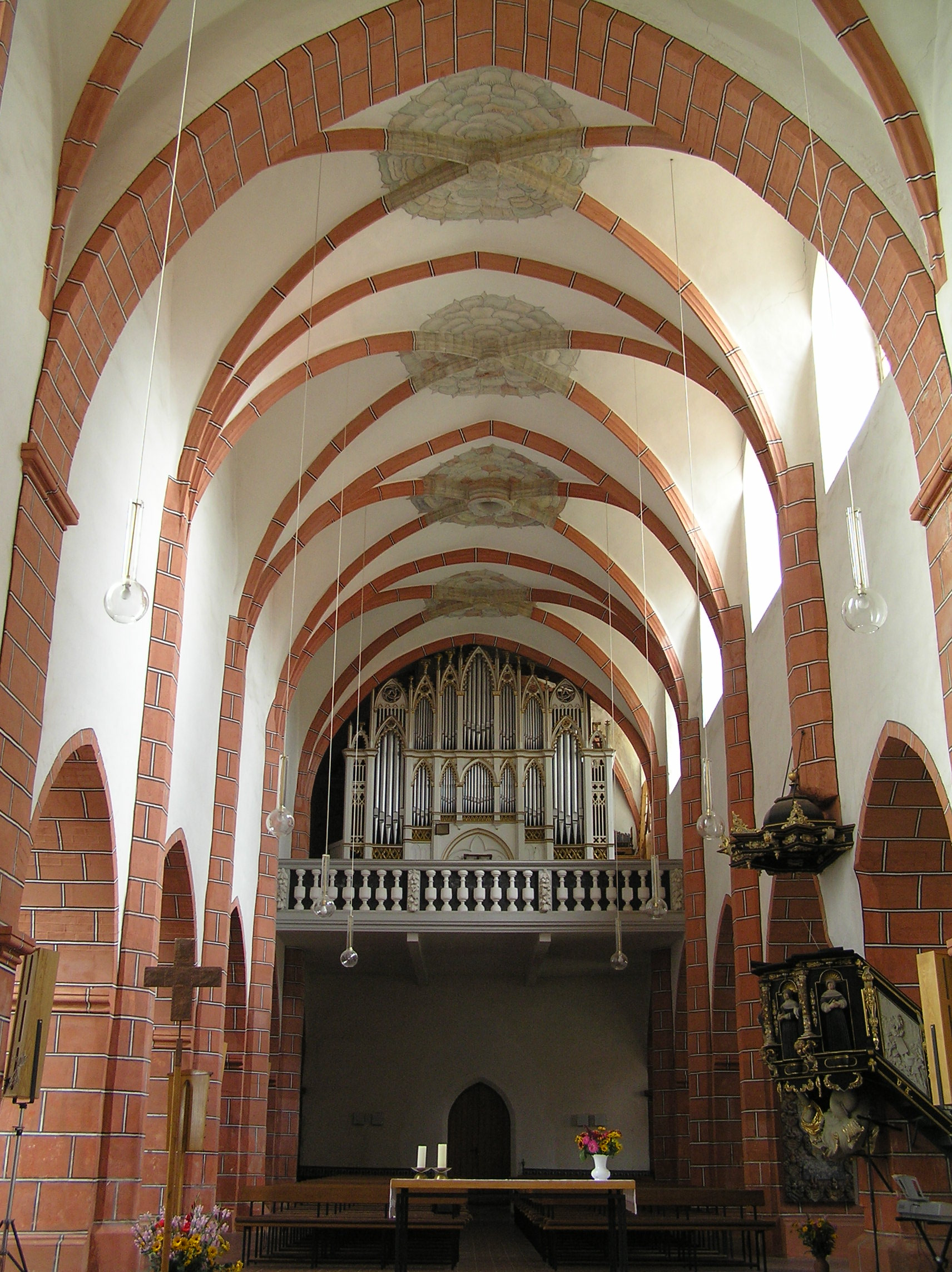 Meißen, Afrakirche